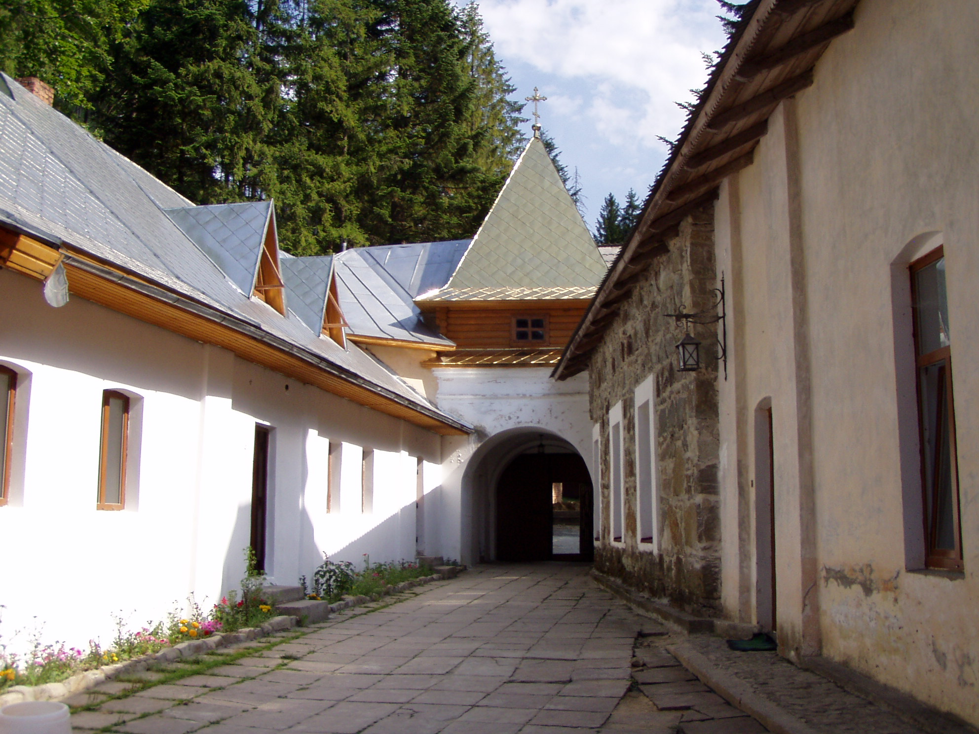 Wnętrze skitu.